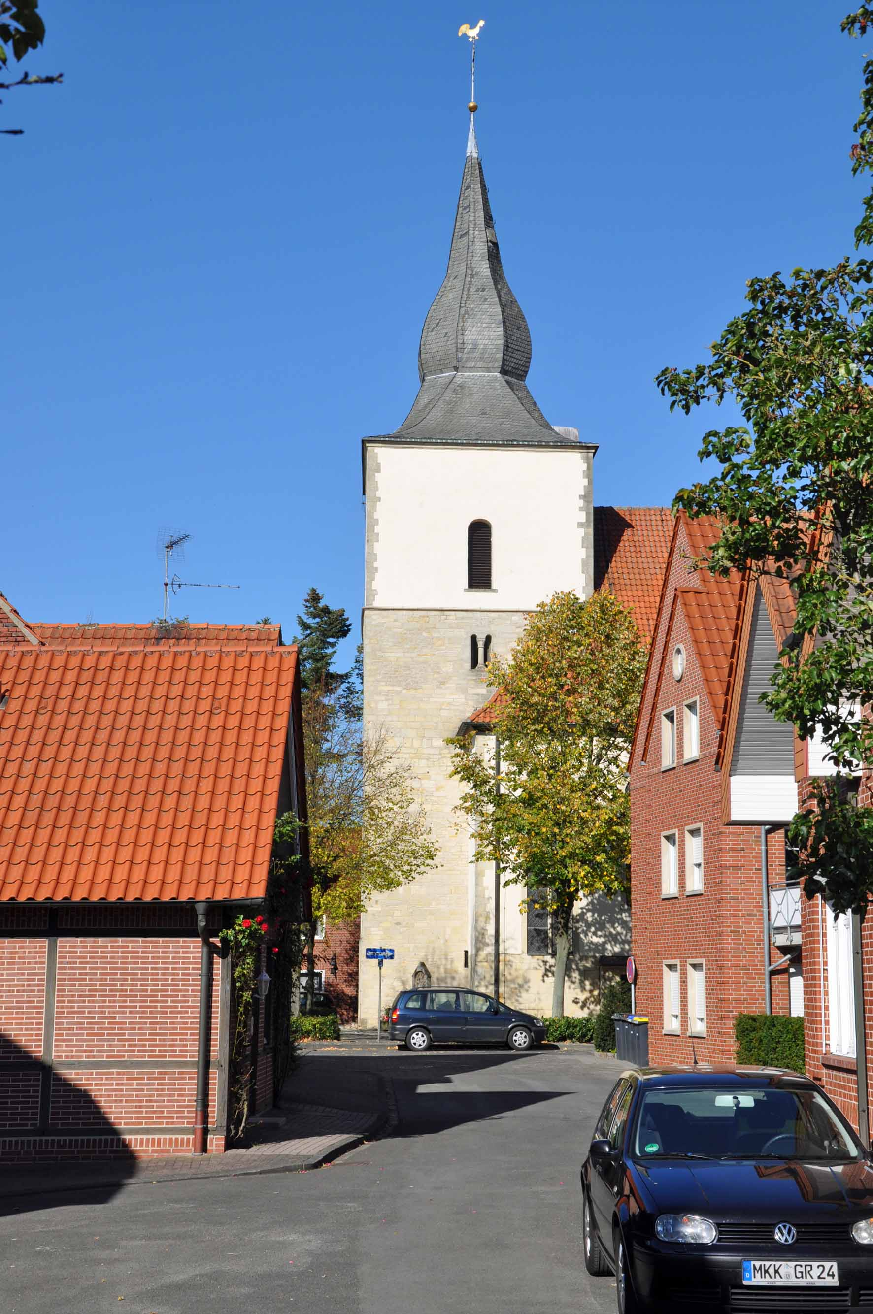 Nikolauskirche in darfeld, rosendahl